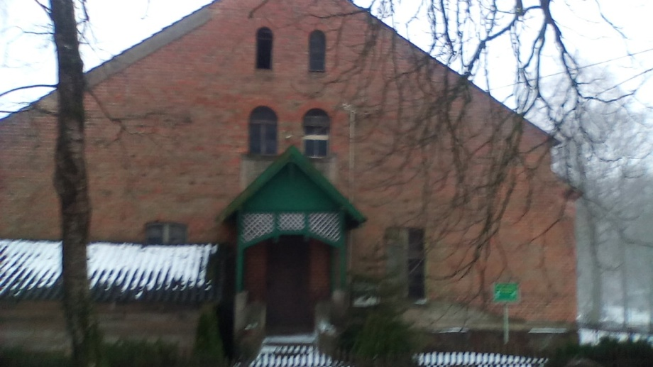 Dawna Gorzelnia w Suminie